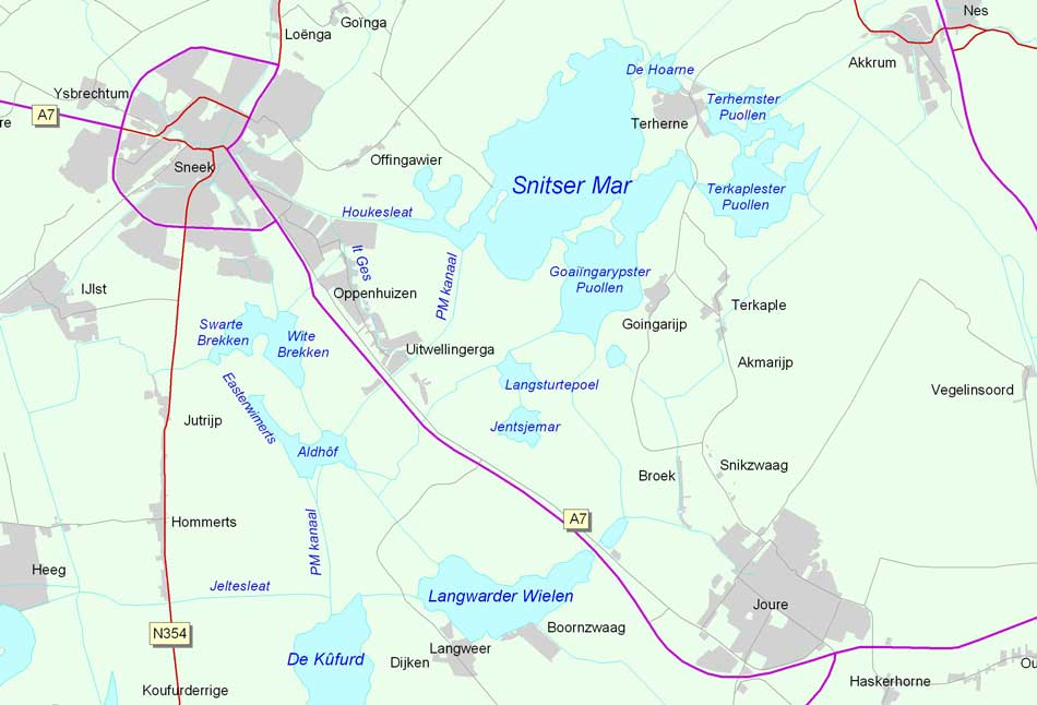 Zelfgemaakt GIS-kaartje met de ligging van de belangrijkste wateren tussen Sneek, Joure en Akkrum. De namen van de wateren zijn volgens de officiële schrijfwijze per 15 maart 2007.